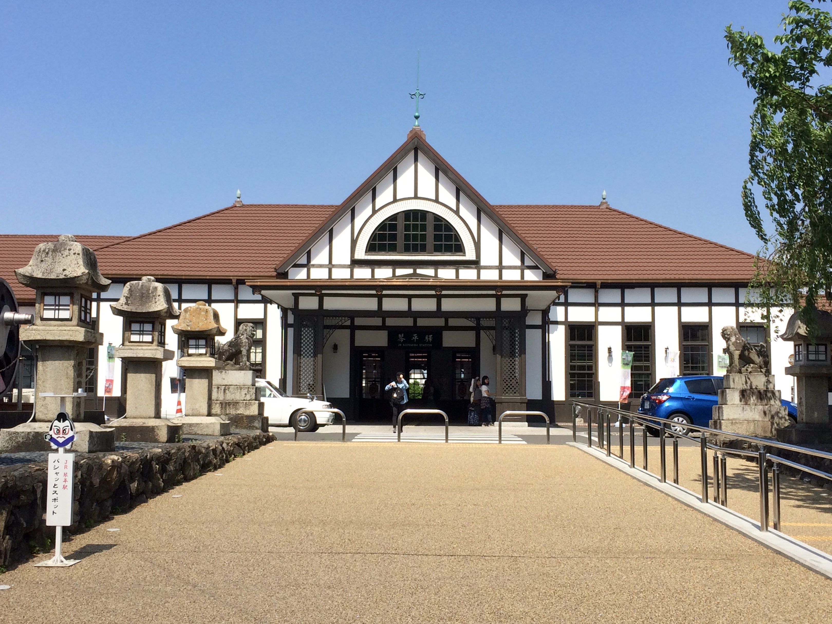 JR四国土讃線琴平駅駅舎（リニューアル後）